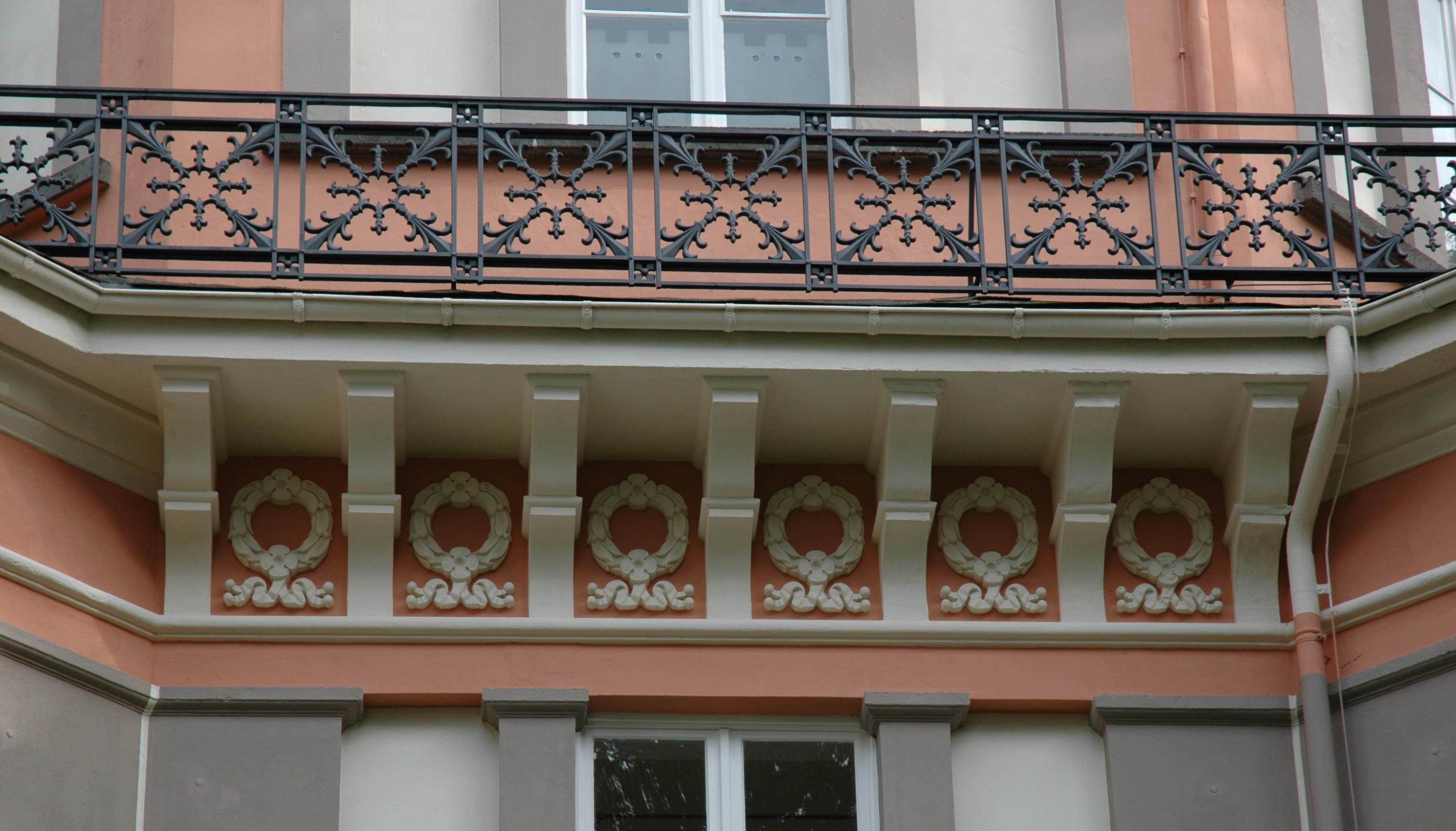 Komsolgesims am Haus Greiffenhorst in Krefeld-Linn